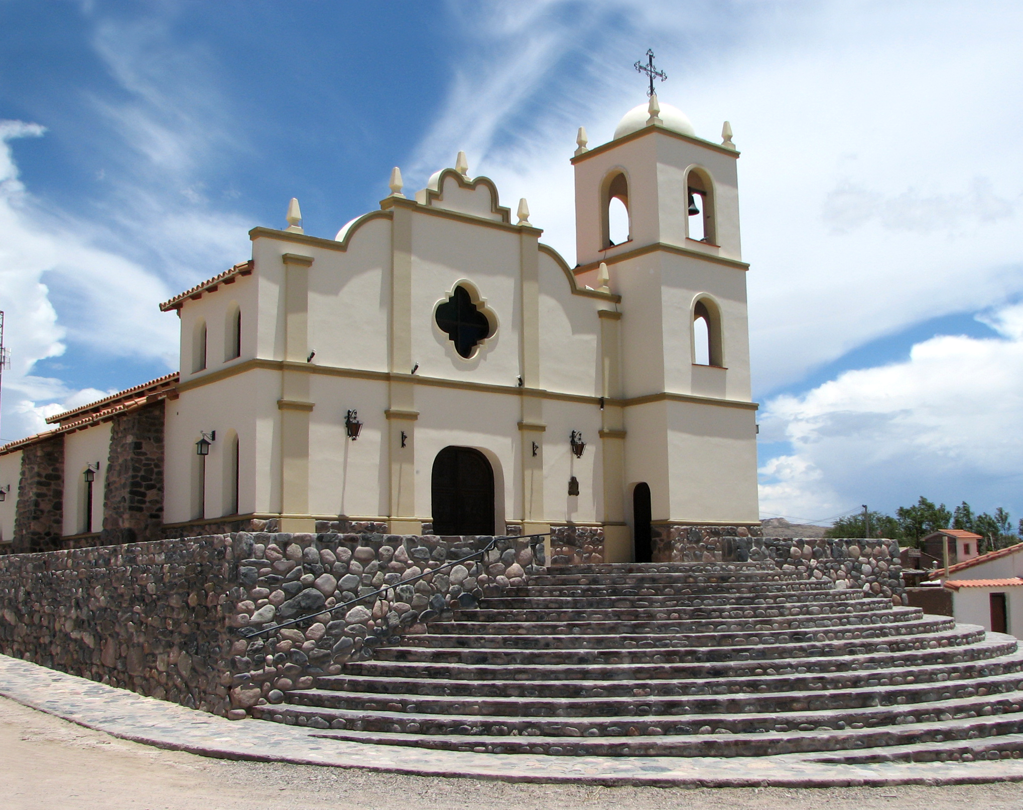 Église d'Angastaco, province de Salta, Argentine